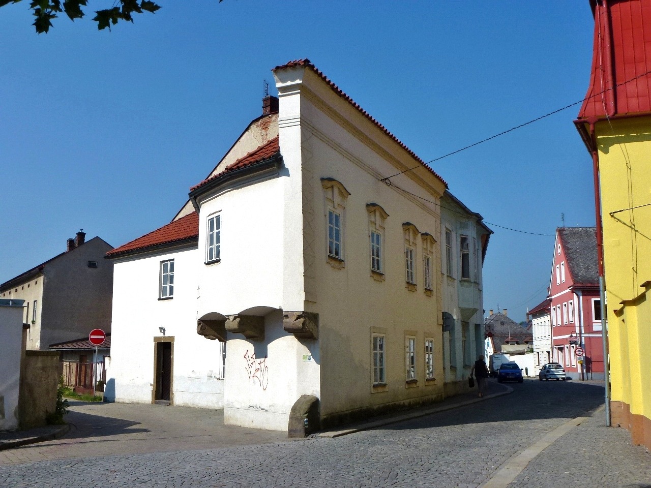 Městský dům zv. Piano (Lanškroun), 28. října 202, Lanškroun